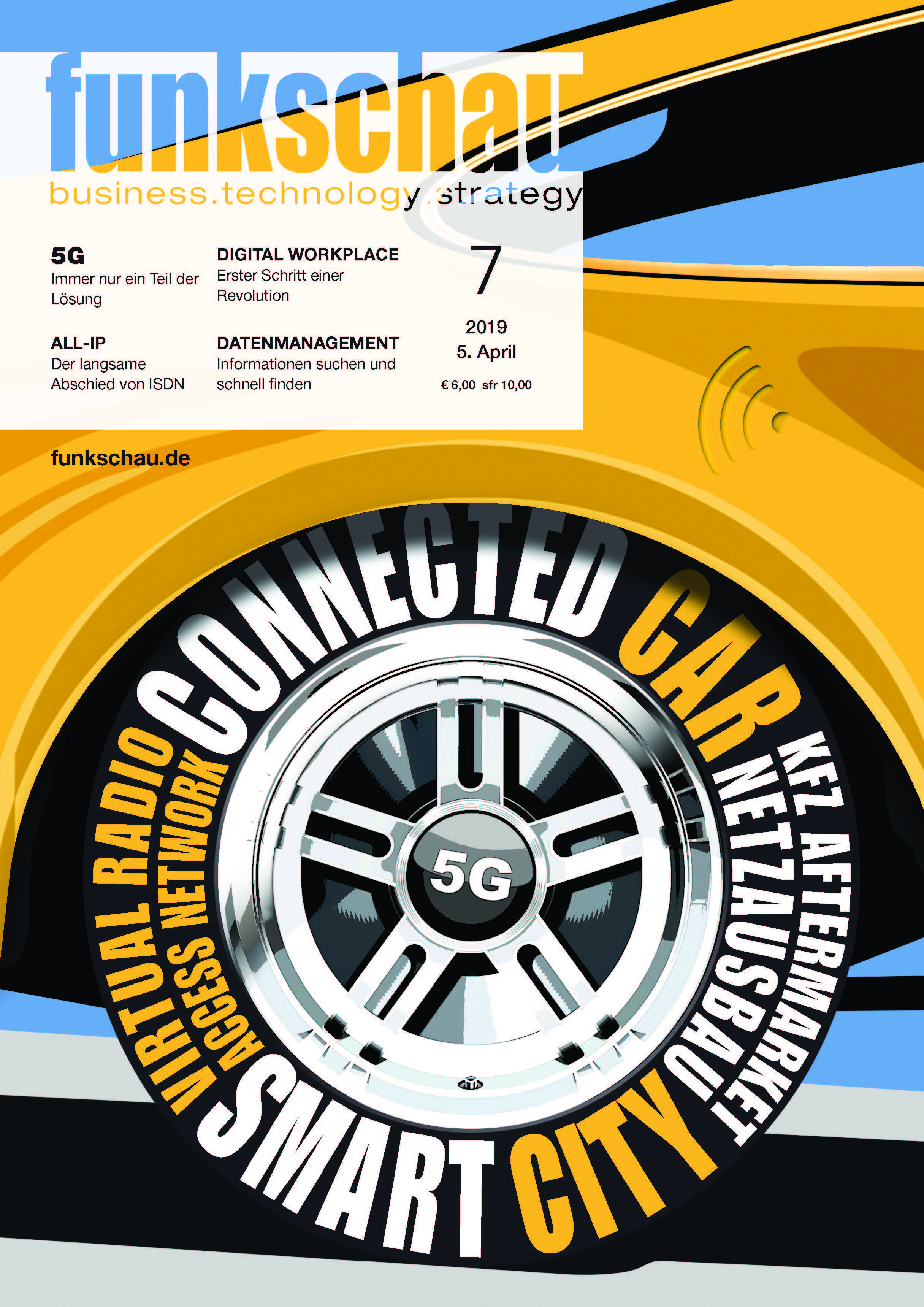 Titelcover der funkschau Ausgabe 7/2019